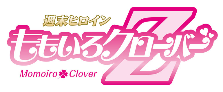 グループのロゴ